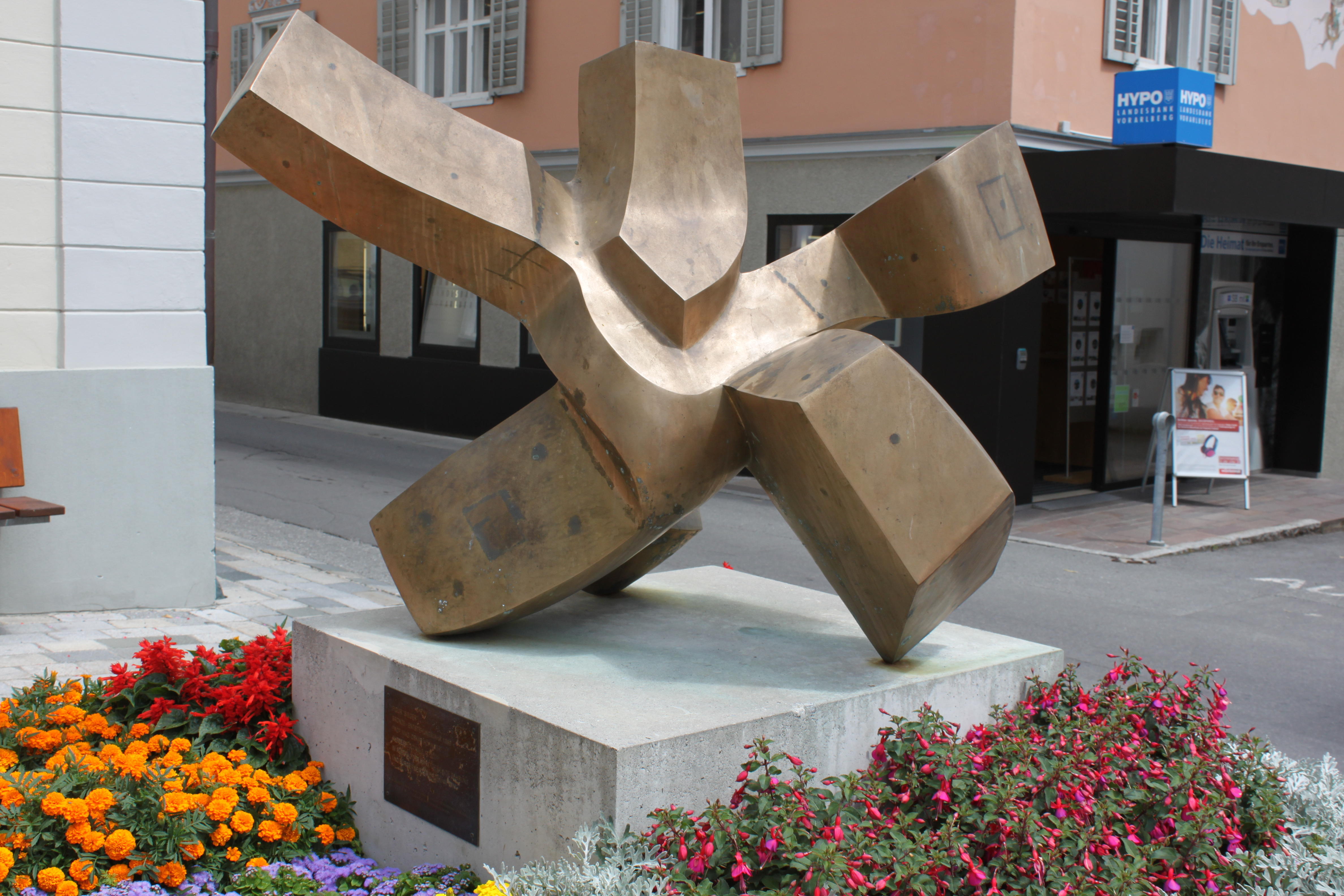 Bronze von Oskar Höfinger aus 1969, 2009 aufgestellt am Kirchplatz in Schruns, im Hintergrund Hypo-Bank